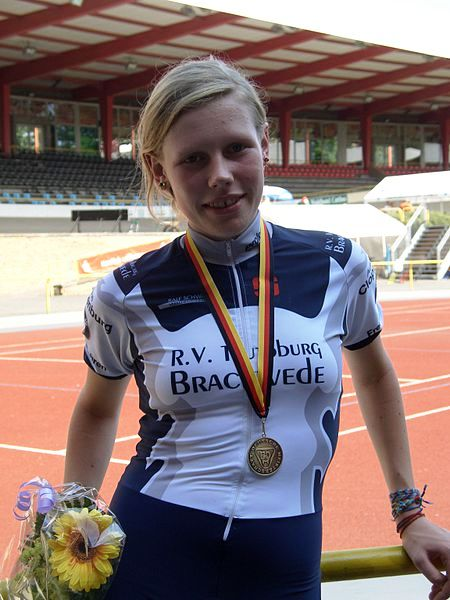 Mieke Kröger, Radsportler